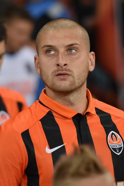 Шахтер 2:0 Истанбул Башакшехир